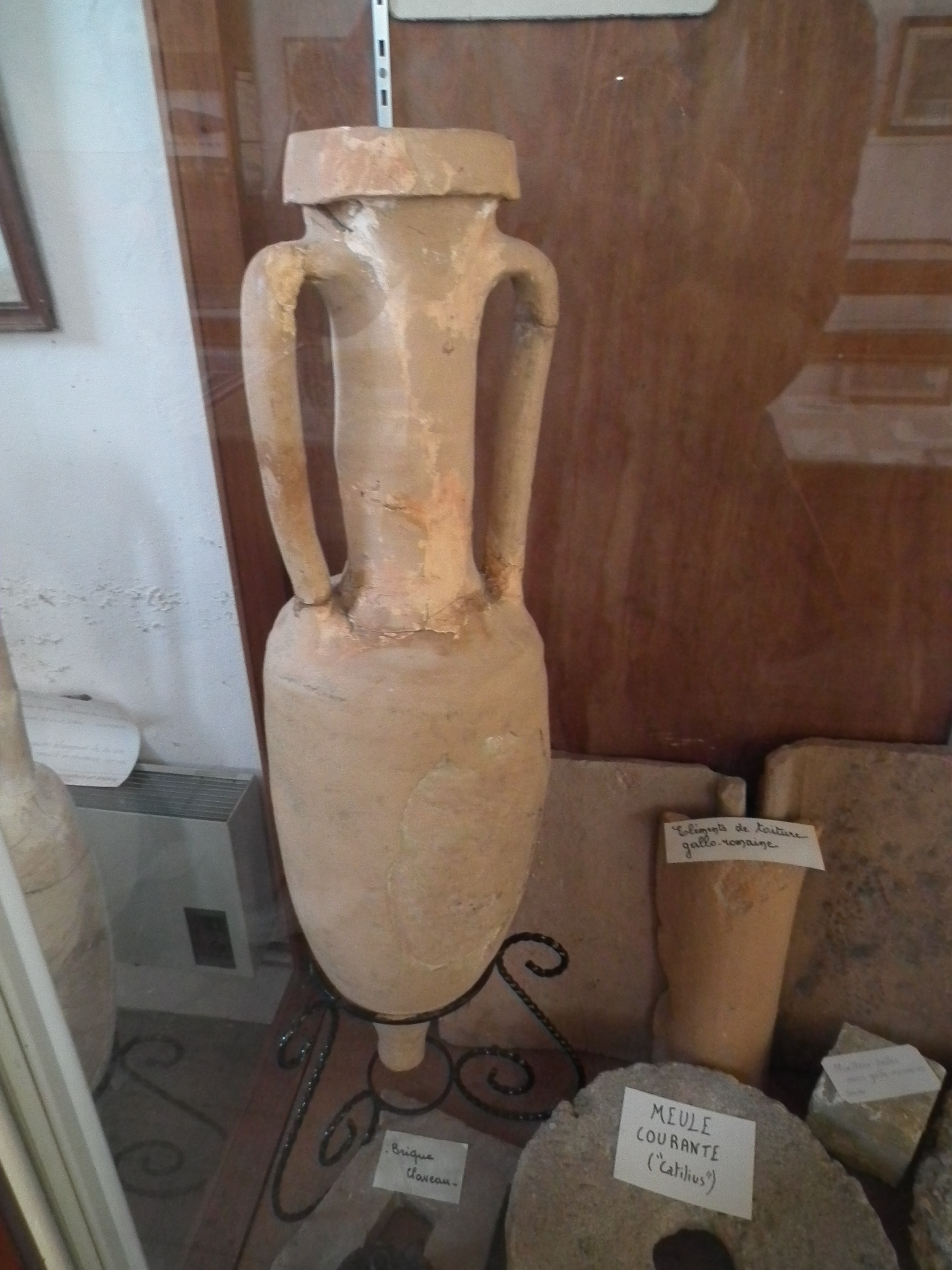 Amphores, meule, tuiles et céramiques romaines au musée de Pons